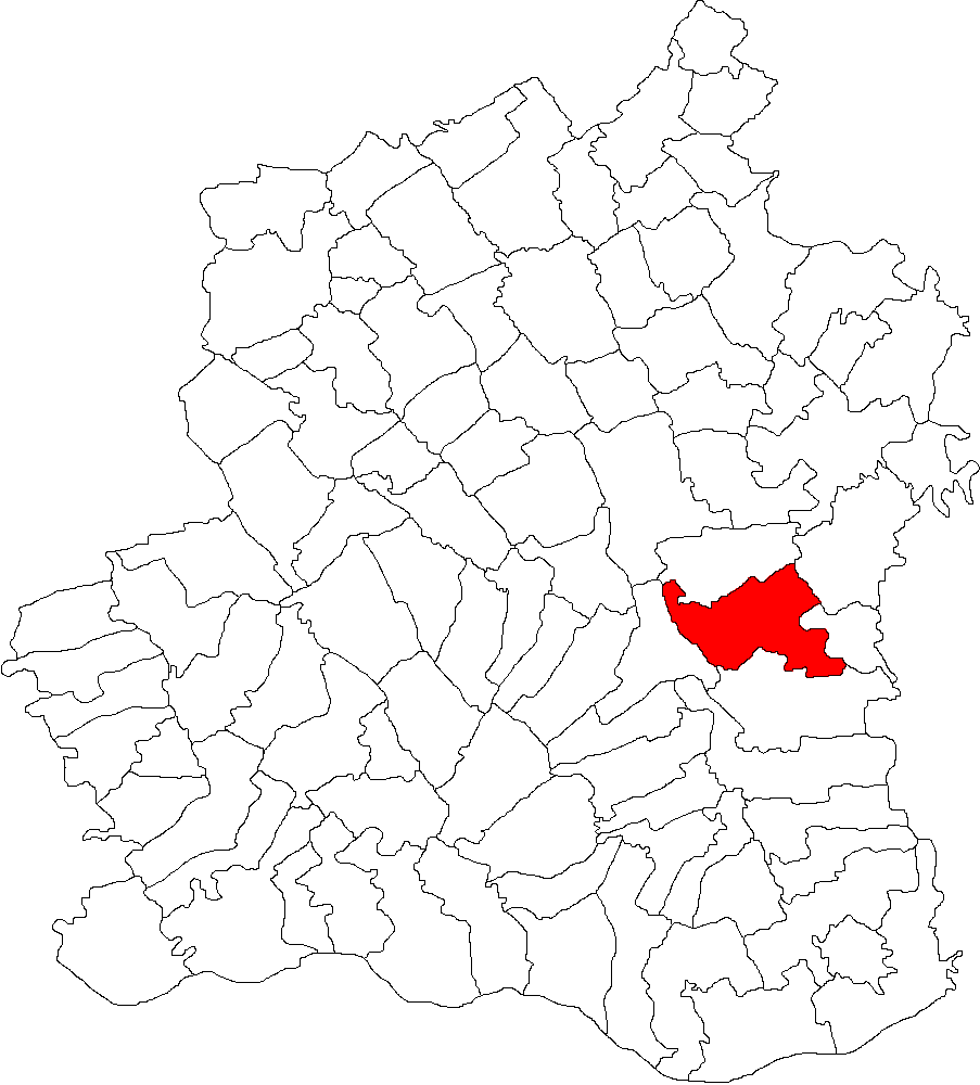 Categorie:Hărţi ale judeţului Teleorman